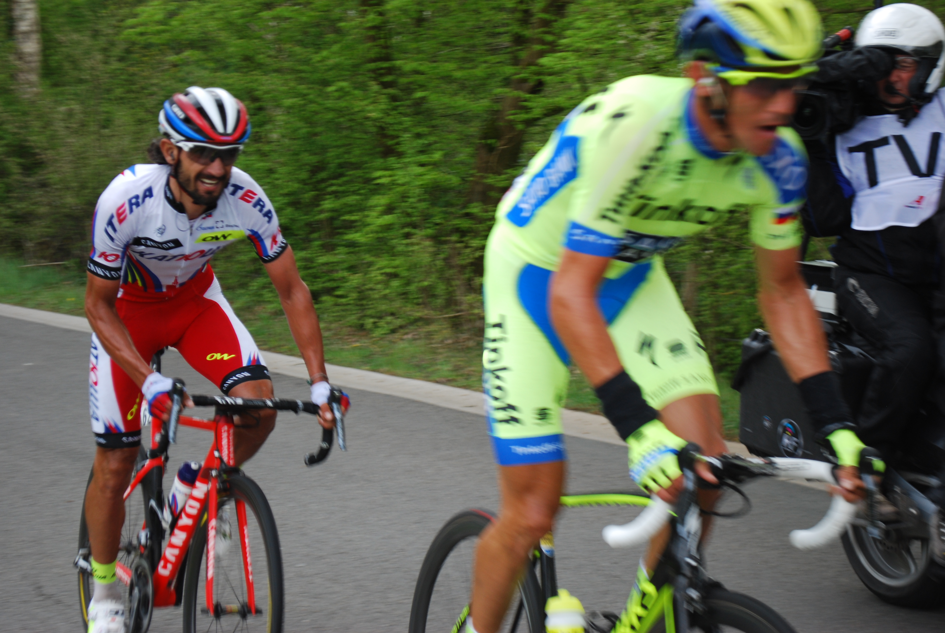 Vue de la course cycliste "Liège-Bastogne-Liège" au sommet de la côte de la Roche aux Faucons, à Esneux, le dimanche 26 avril 2015.